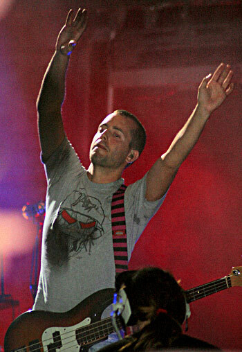 Manilva 22/08/06